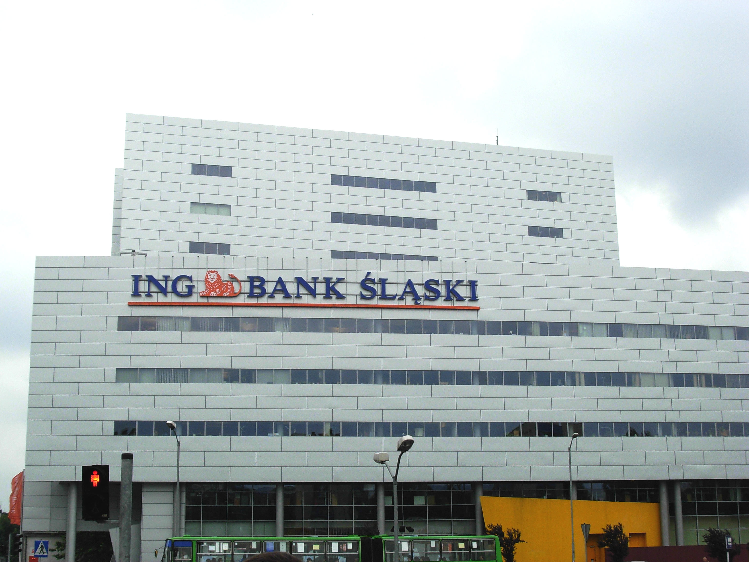 Katowice